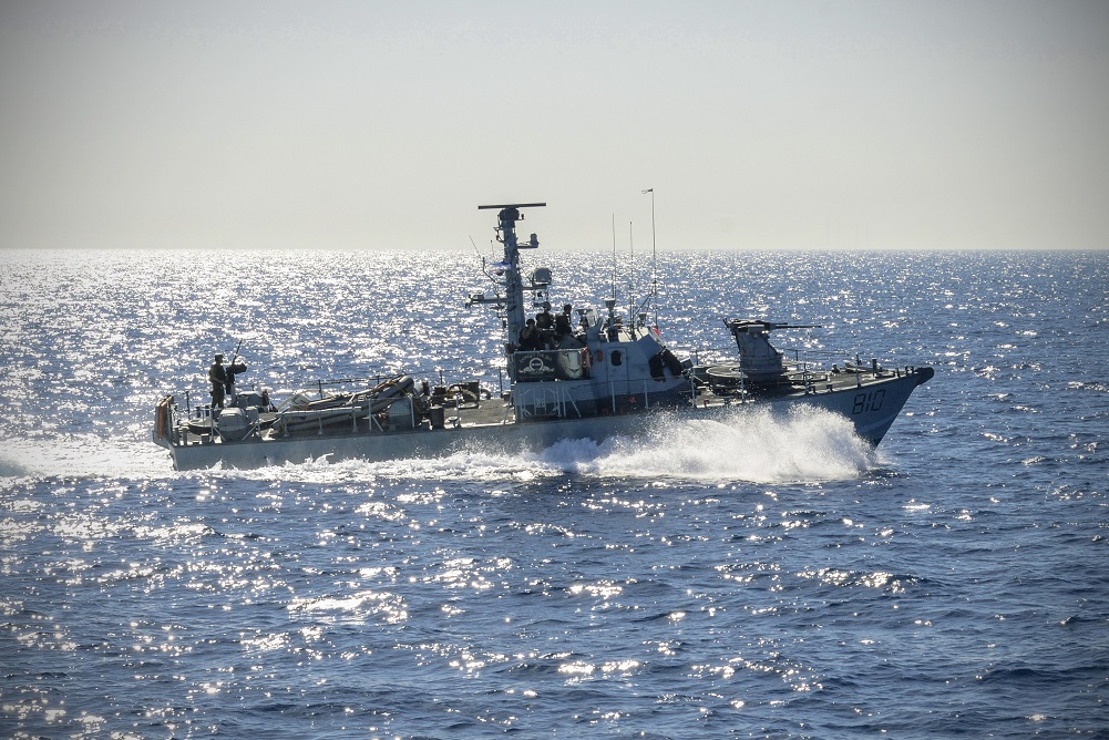 דבורה בסיור בטחון שוטף